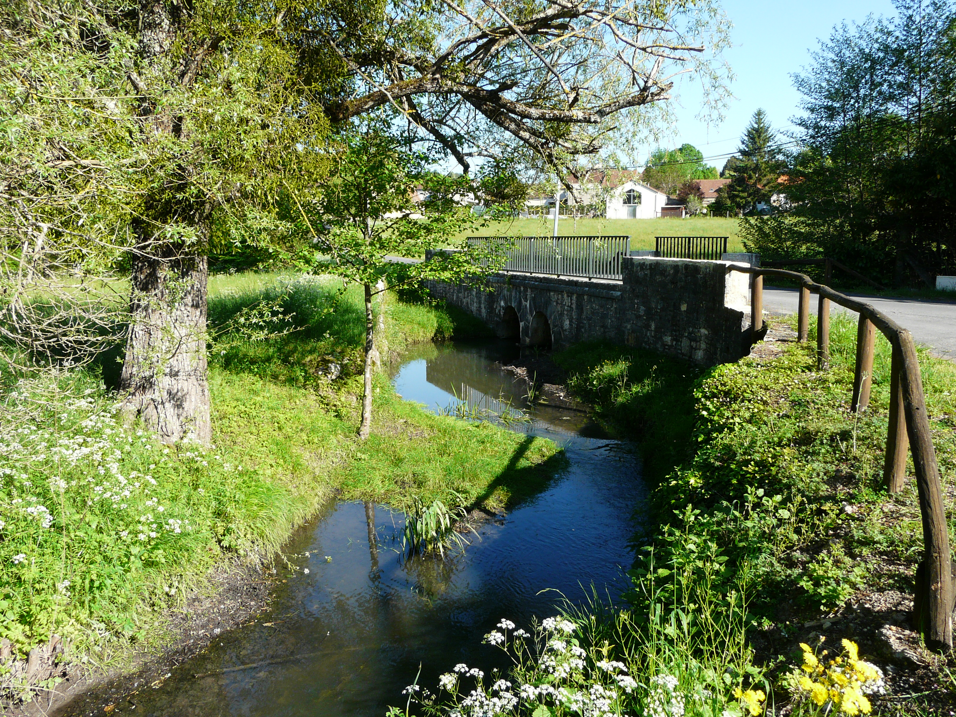 Le Manoire en aval du pont allant vers Bonneval, Fossemagne, Dordogne, France. Vue prise en direction de l'amont.